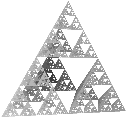 Sierpinskitriangel i 3D version, en fraktal. Kategori:Bilder av fraktaler